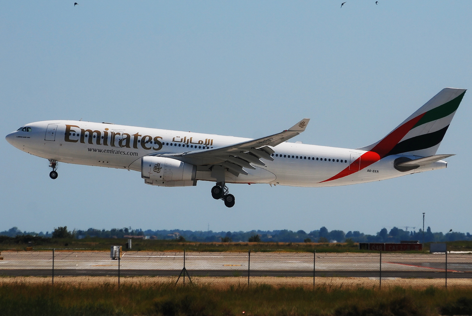 Photo prise à l'aéroport de Venise-Marco Polo (LIPZ) en Italie. Picture take at Venice-Marco Polo Airport (LIPZ) in Italy.